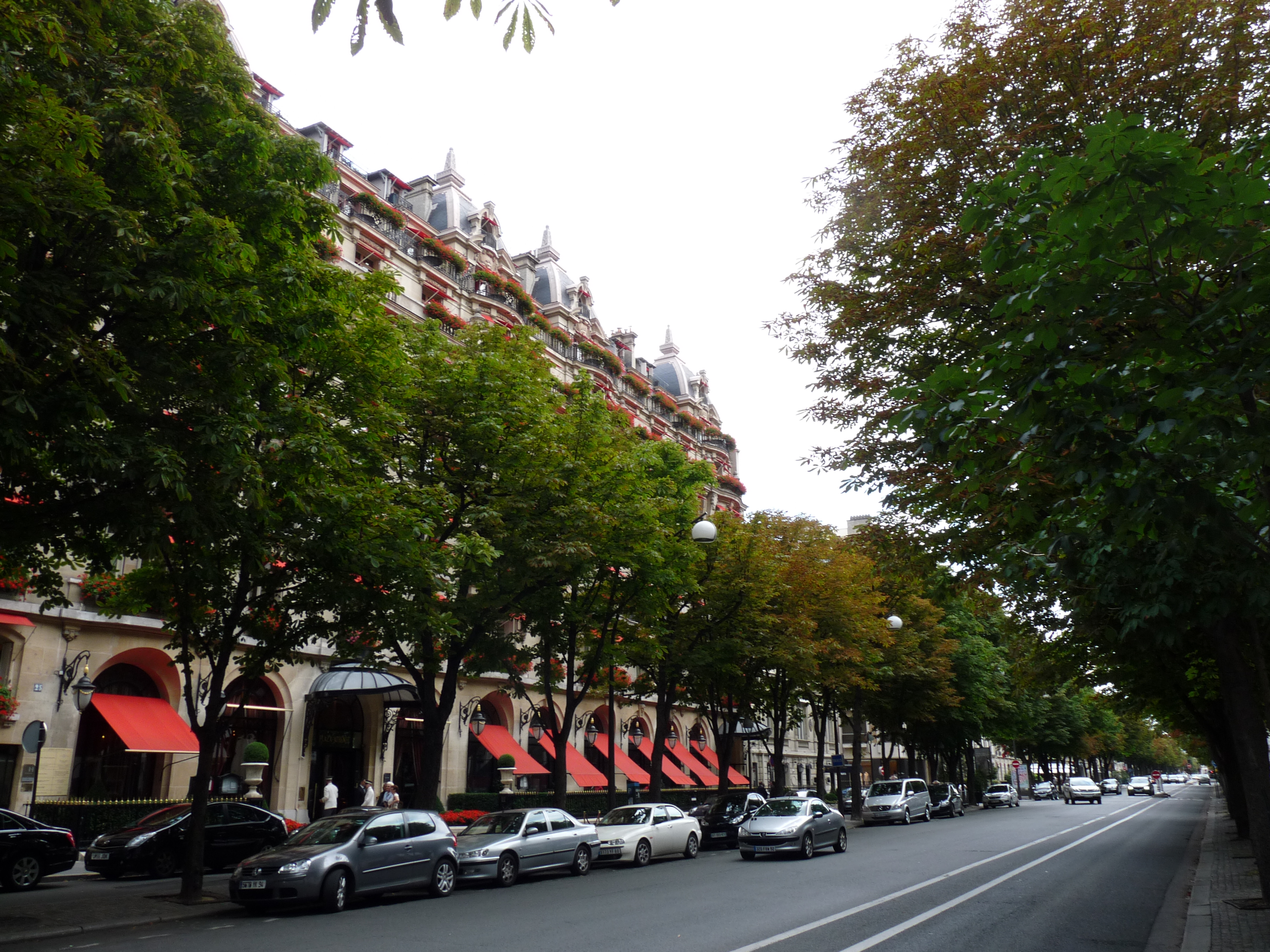 Arbres d'alignement devant le palace “Plaza Athénée”, vue de l'avenue Montaigne en direction du Rond-Point des Champs Élysées, Paris, France.